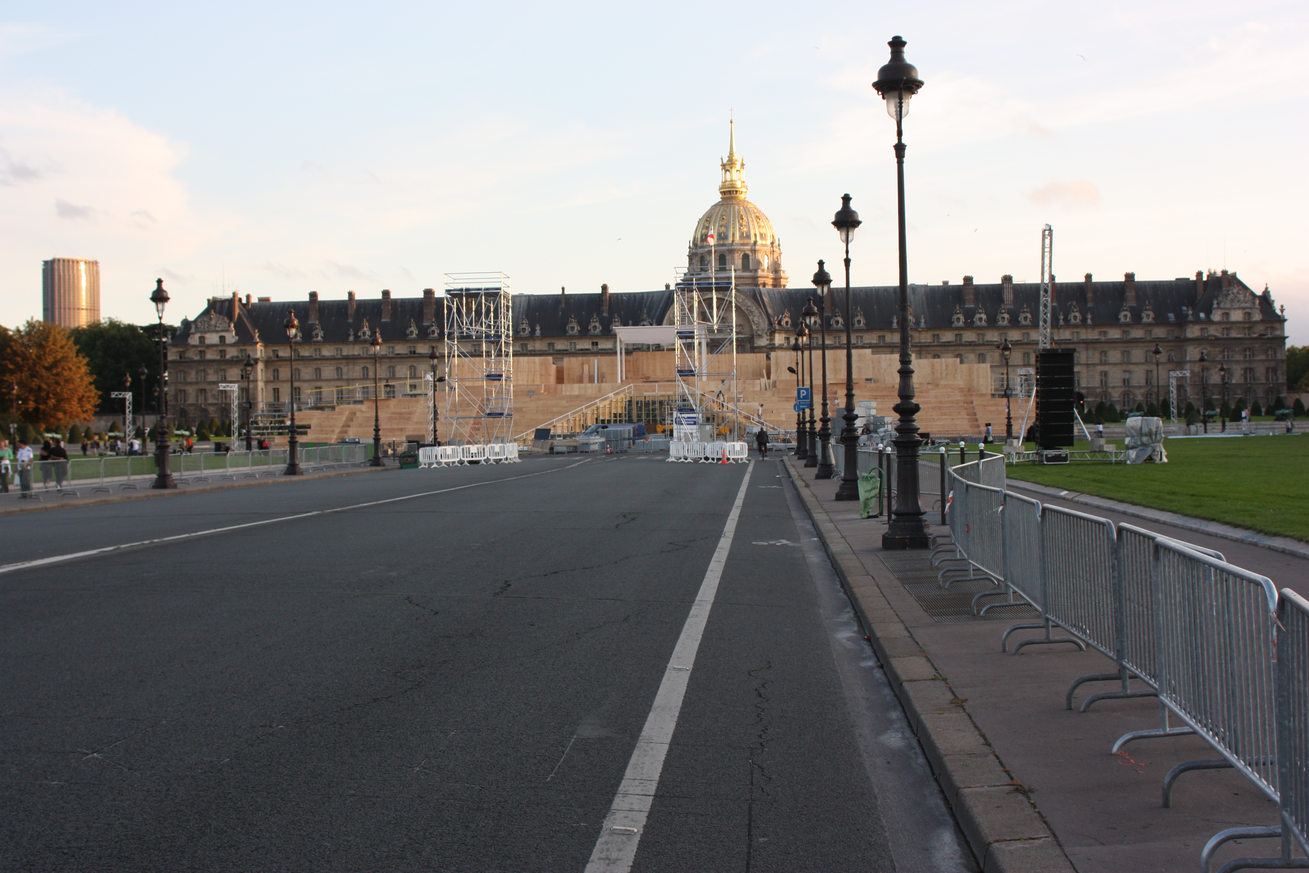 Visite Benoit XVI à Paris - L'estrade - Les invalides - 9 Septembre 2008 2008 France visit of Pope Benedictus XVI.